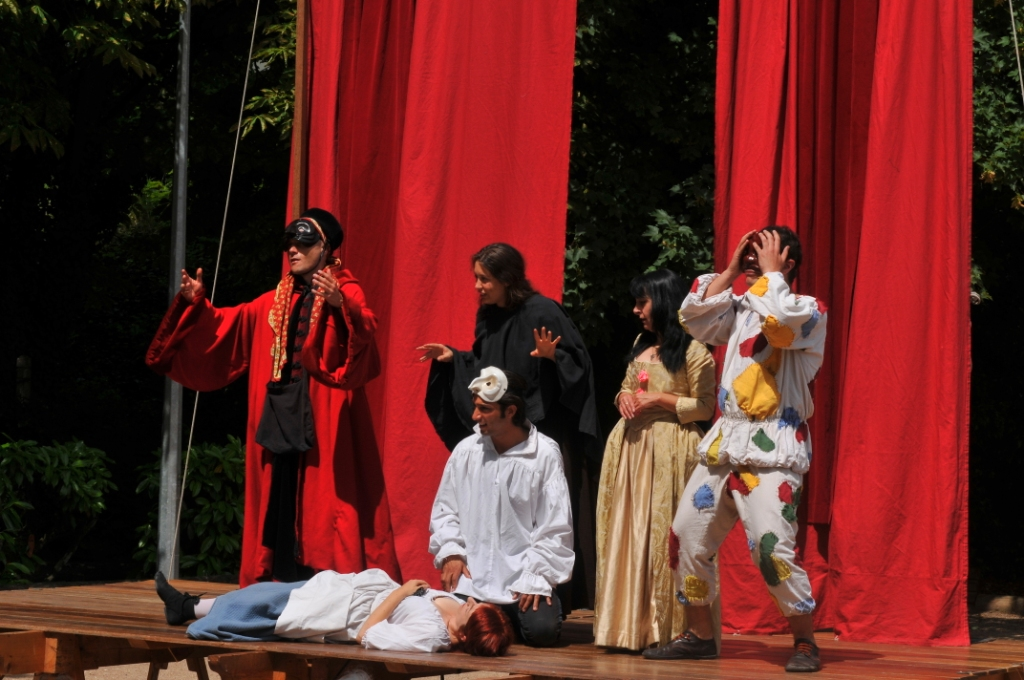 Improvviso (mise en scène par Carlo Boso) au festival Le Mois Molière en juin 2009.